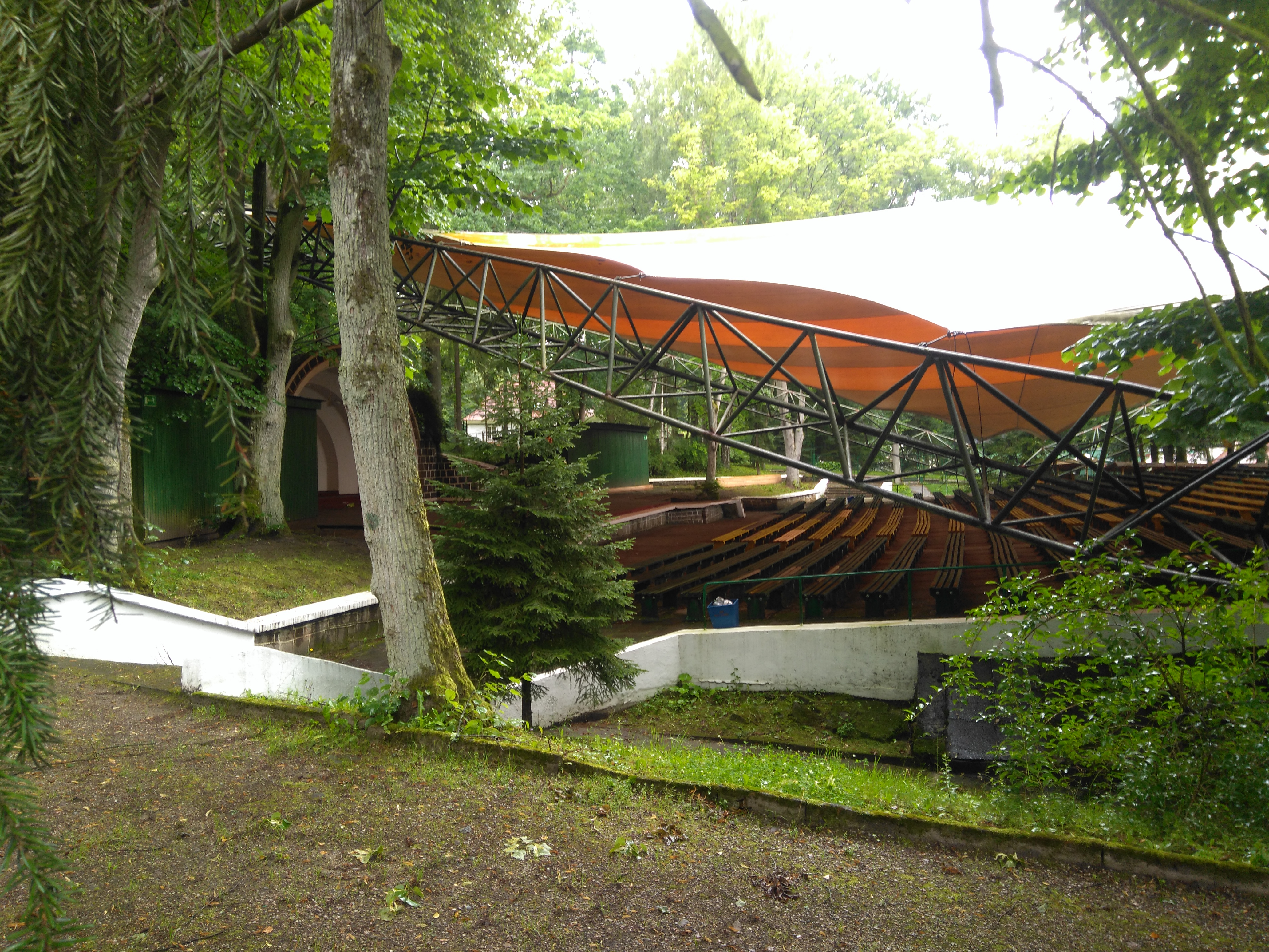 gmina Połczyn-Zdrój, park zdrojowy, 1 poł. XIX